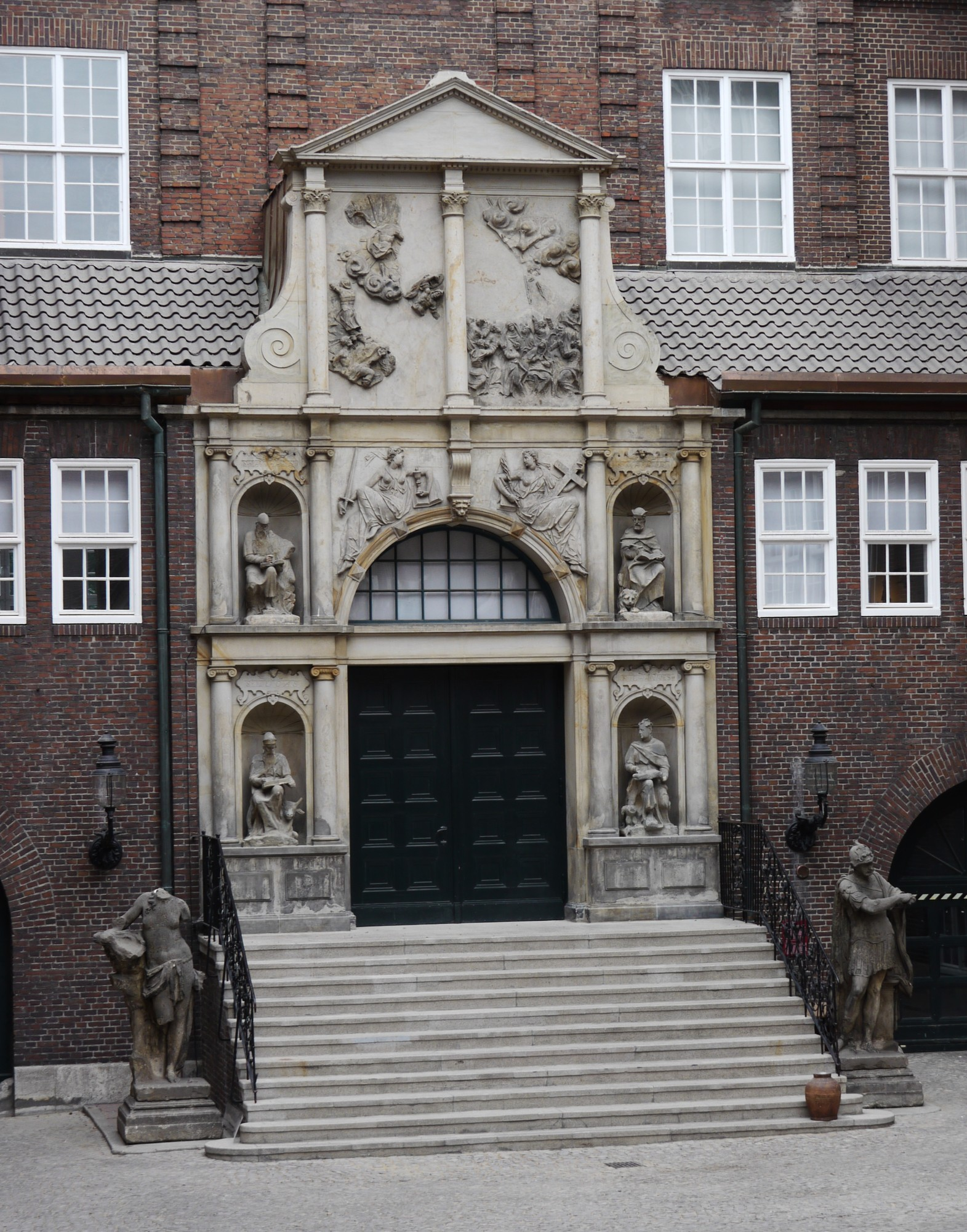 Südportal St. Petri im Hamburgmuseum Hamburg Museum Native nameMuseum für Hamburgische GeschichteParent institutionStiftung Historische Museen HamburgLocationHamburgCoordinates53° 33′ 04″ N, 9° 58′ 23″ E Established1908Website